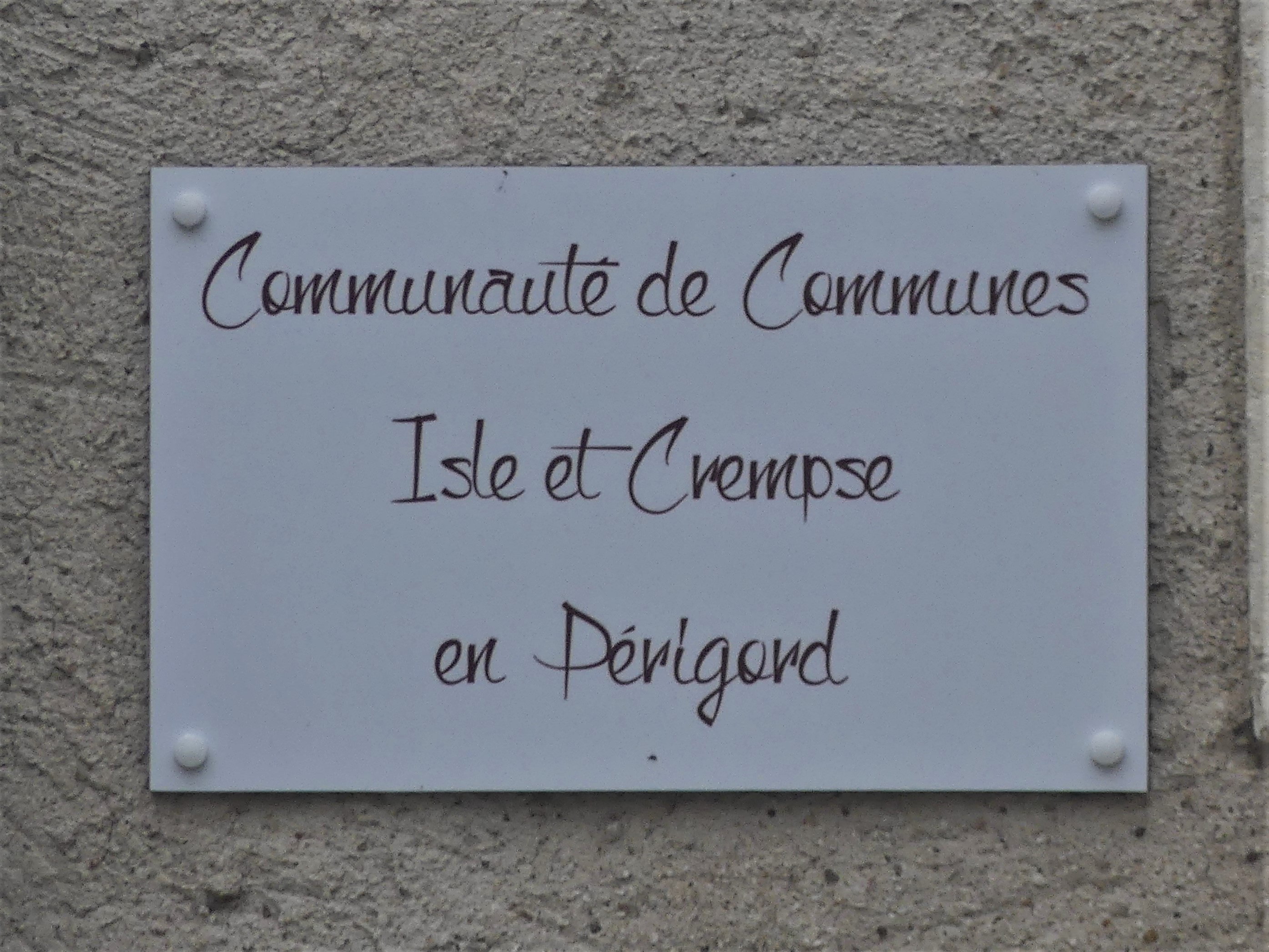 Plaque de la communauté de communes Isle et Crempse en Périgord, Mussidan, Dordogne, France.